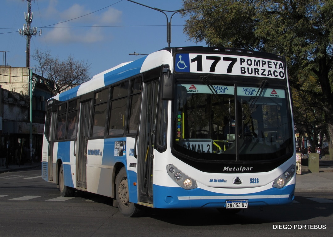 Linea de colectivo que recorre en la Área Metropolitana y Conurbano Bonaerense Sur.